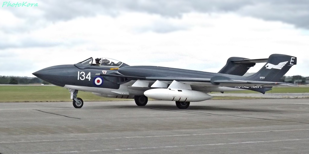 De Havilland Sea Vixen w RNAS Yeovilton